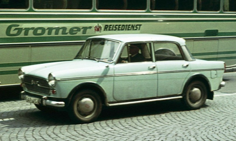 Fiat 1100D bzw "Europa" (1963-65) aus garmisch